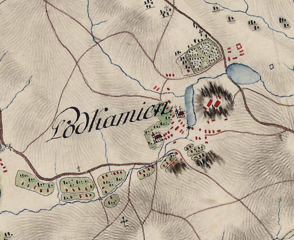 xviii